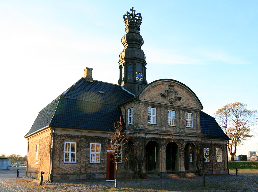 Nyholms hovedvagt, Holmen, København. Bygget 1744. Arkitekt:Philip de Lange.